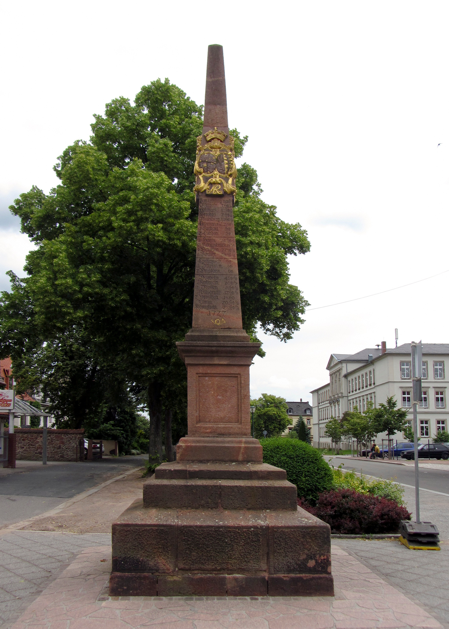 Kursächsische Postmeilensäule-Distanzsäule Lindenplatz in Leisnig